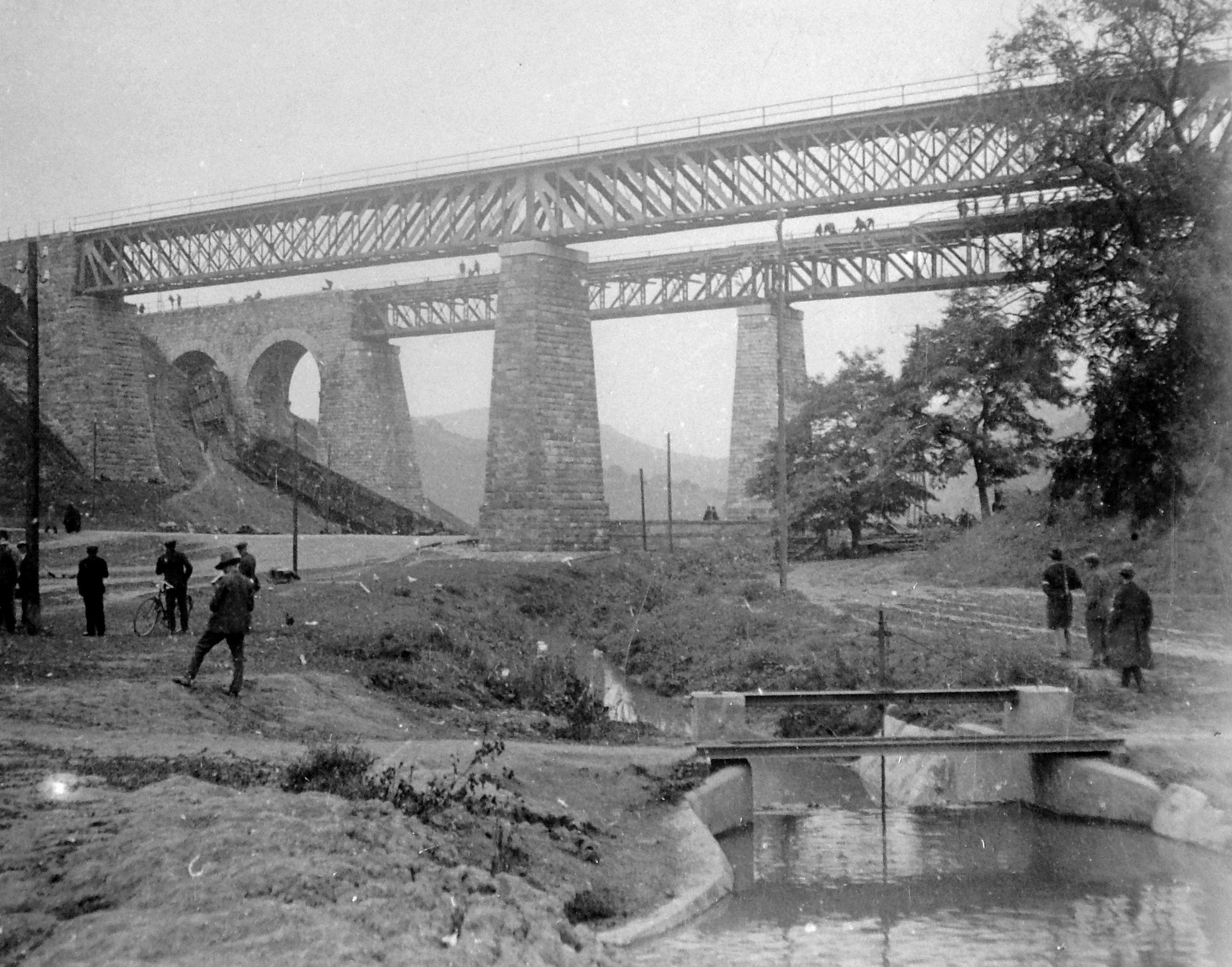 vasúti viadukt az 1931. szeptember 13-i merénylet után. Location: Hungary, Biatorbágy Tags: railway, bridge, railway bridge, wreck Title: vasúti viadukt az 1931. szeptember 13-i merénylet után.